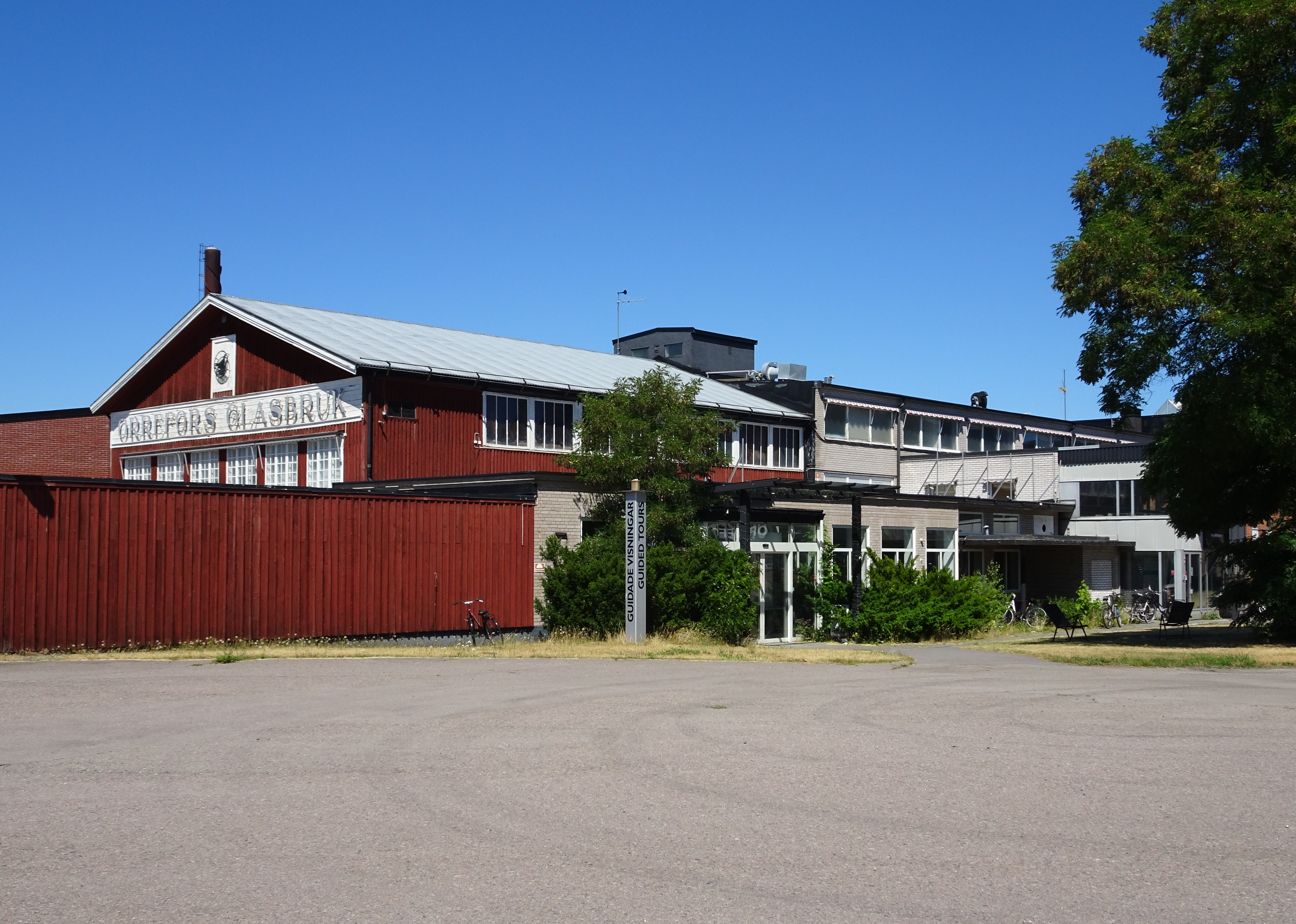 Orrefors glasbruks gamla byggnader